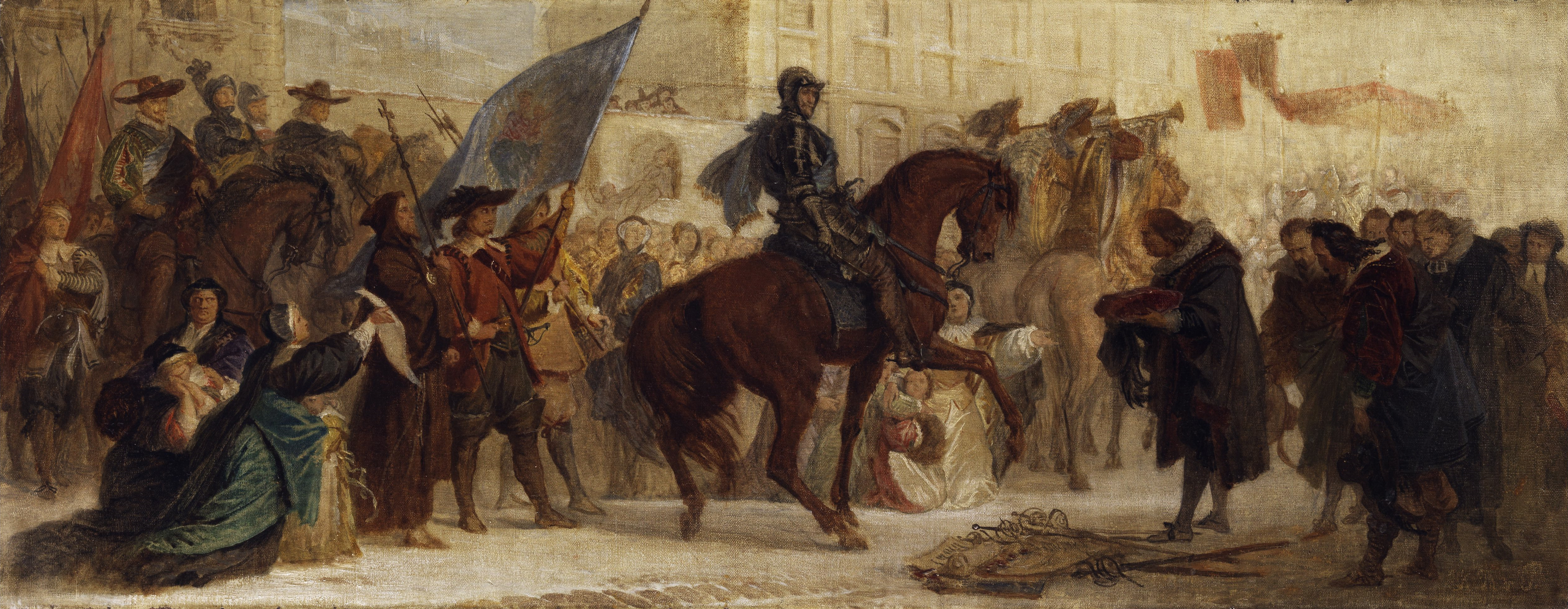 Einzug des Maximilian I. in Prag nach dem Sieg am Weißen Berg 1620; Öl auf Leinwand; 35 x 88 cm.